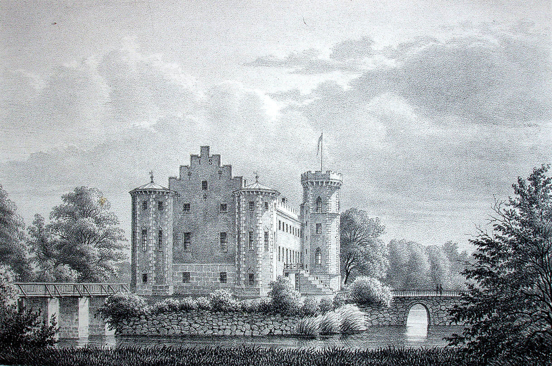 Basnæs (tidl. Bastnæs) er en gammel hovedgård, som nævnes første gang i 1426. Gården ligger på et voldsted i Tjæreby Sogn, Vester Flakkebjerg Herred, Region Sjælland, Slagelse Kommune. Hovedbygningen med tre hjærnetårne er opført i 1842-1846 ved G.F. Hetsch.